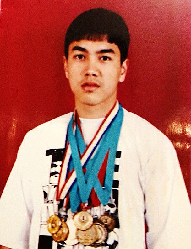 Дуйсенов Кайрат Сансызбаевич — казахстанский тхэквондист.